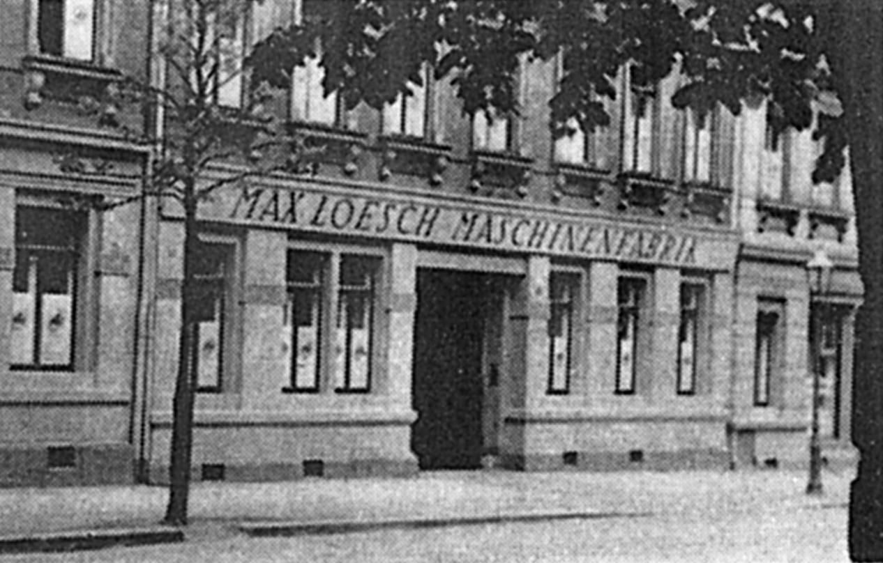 Fassade des Hauses mit Einfahrt zur Firma Max Loesch in Dresden-Plauen, Zwickauer Str. 130, siehe heutiges Aussehen File:DD-ZwickauerStr-130.jpg